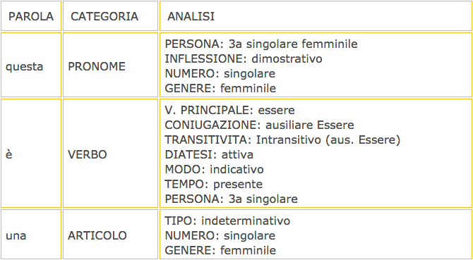 Esempio di analisi grammaticale. Ciascuna parola è stata assegnata ad una categoria lessicale (pronome, verbo, articolo), e sono state identificate le carratteristiche principali (genere, numero per pronome ed articolo, diatesi, modo, tempo, persona per il verbo)